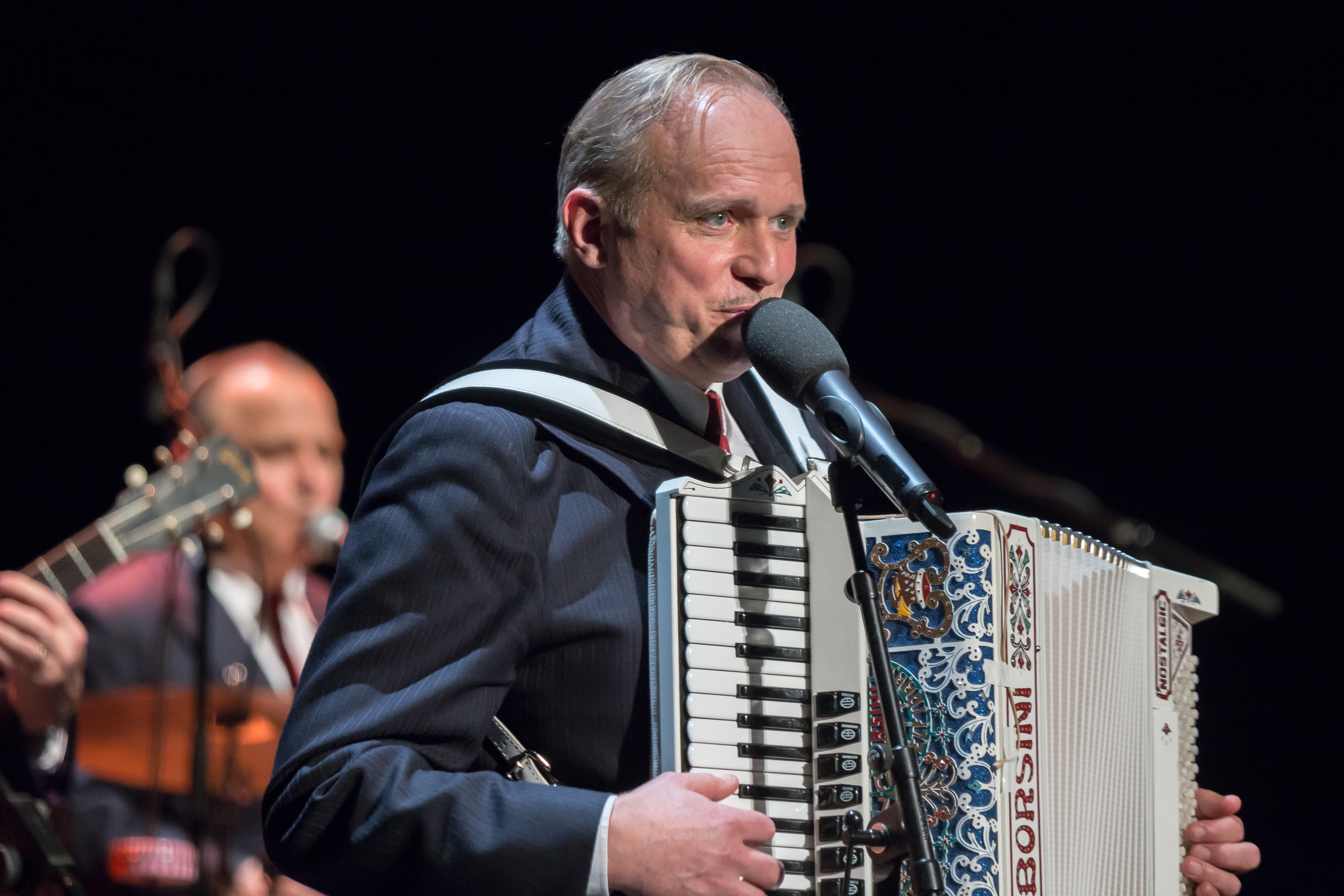 Ulrich Tukur bei seinem Auftritt im Anhaltischen Theater am 02.03.2017.